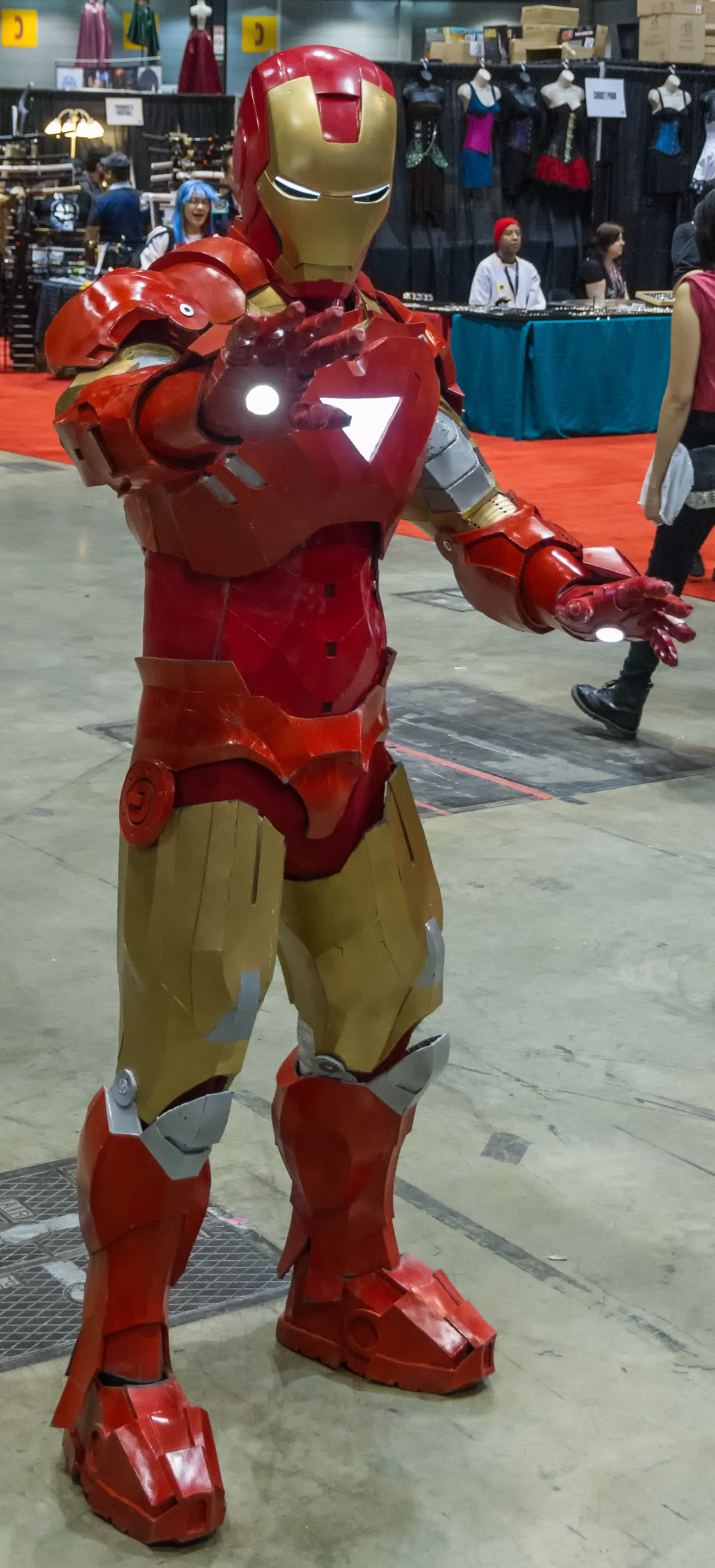 c2e2